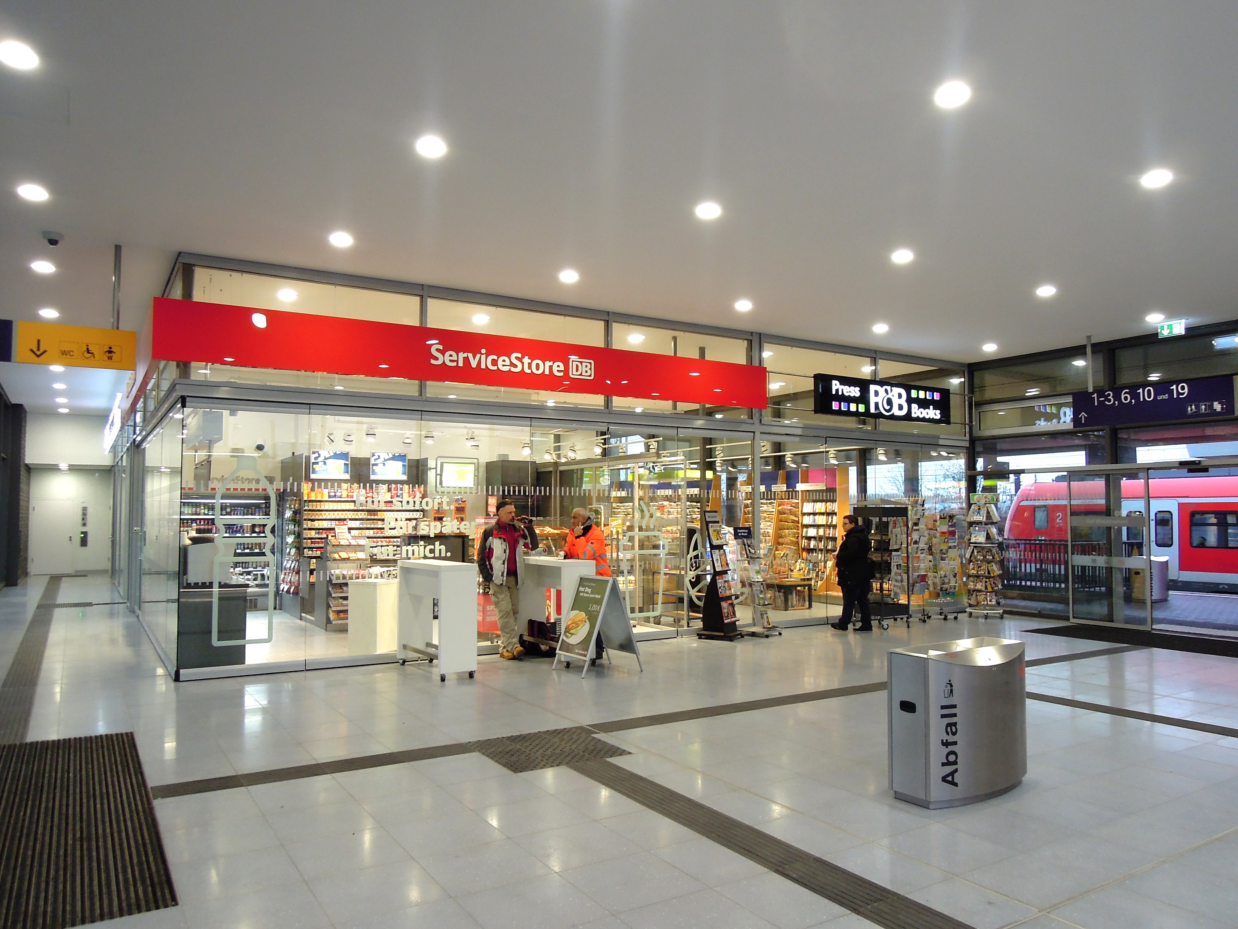 Bahnhof Horrem im Januar 2015.